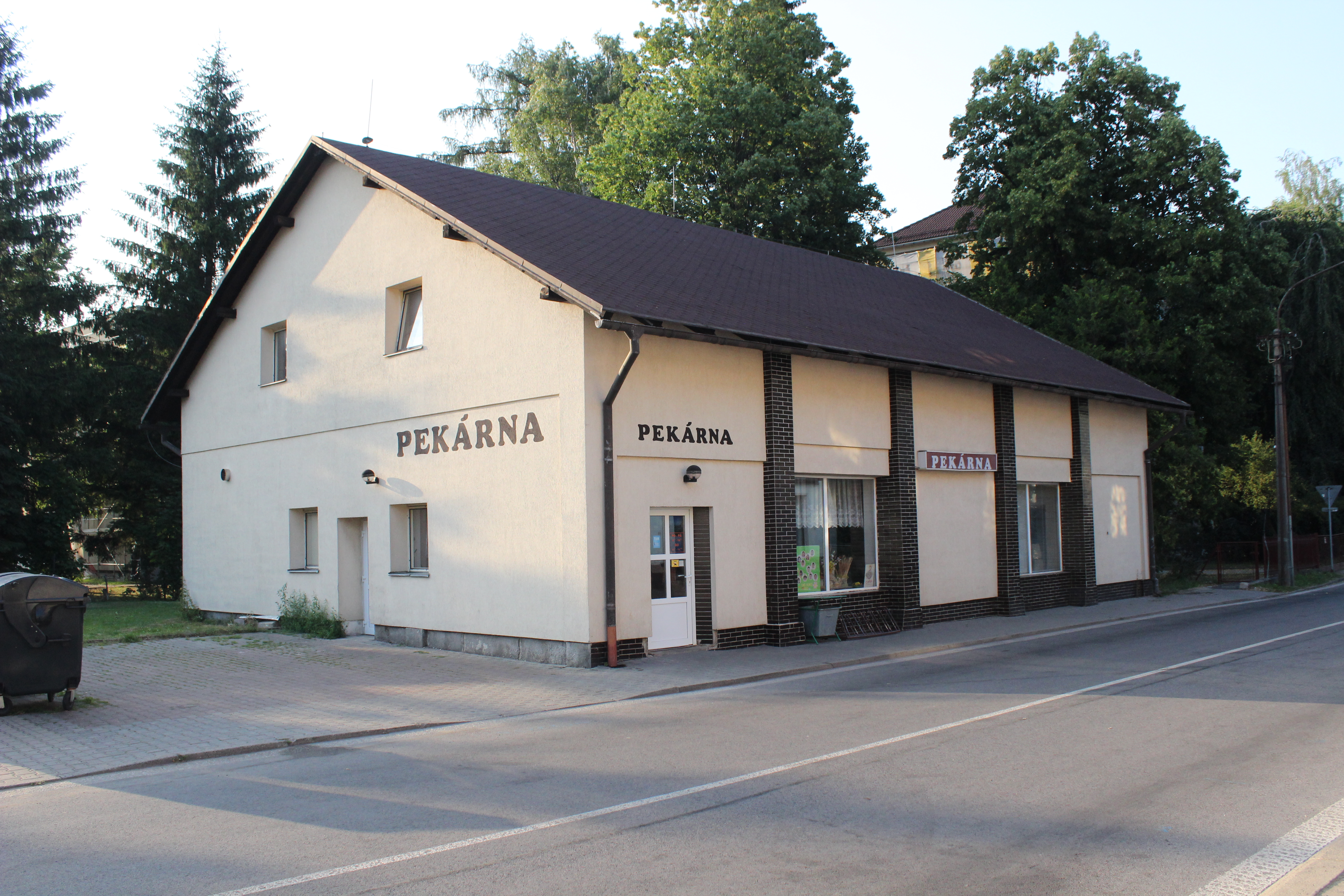 Někdejší hasičská zbrojnice v Hejnicích, posléze pekárna (dům číslo popisné 373).